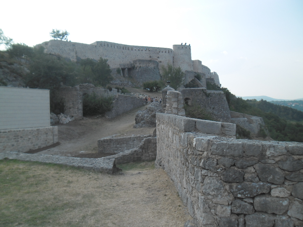 proslava Dana pobjede i domovinske zahvalnosti (20. obljetnice vojno-redarstvene operacije Oluje) u Kninu 5. kolovoza 2015.